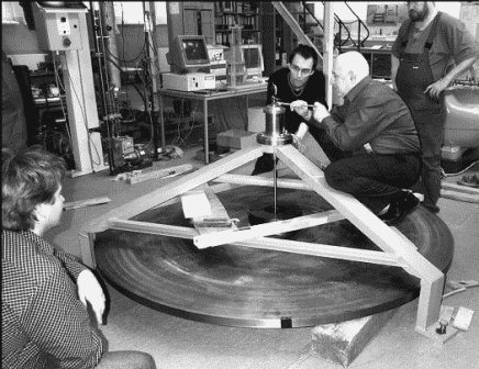 Супермаховик